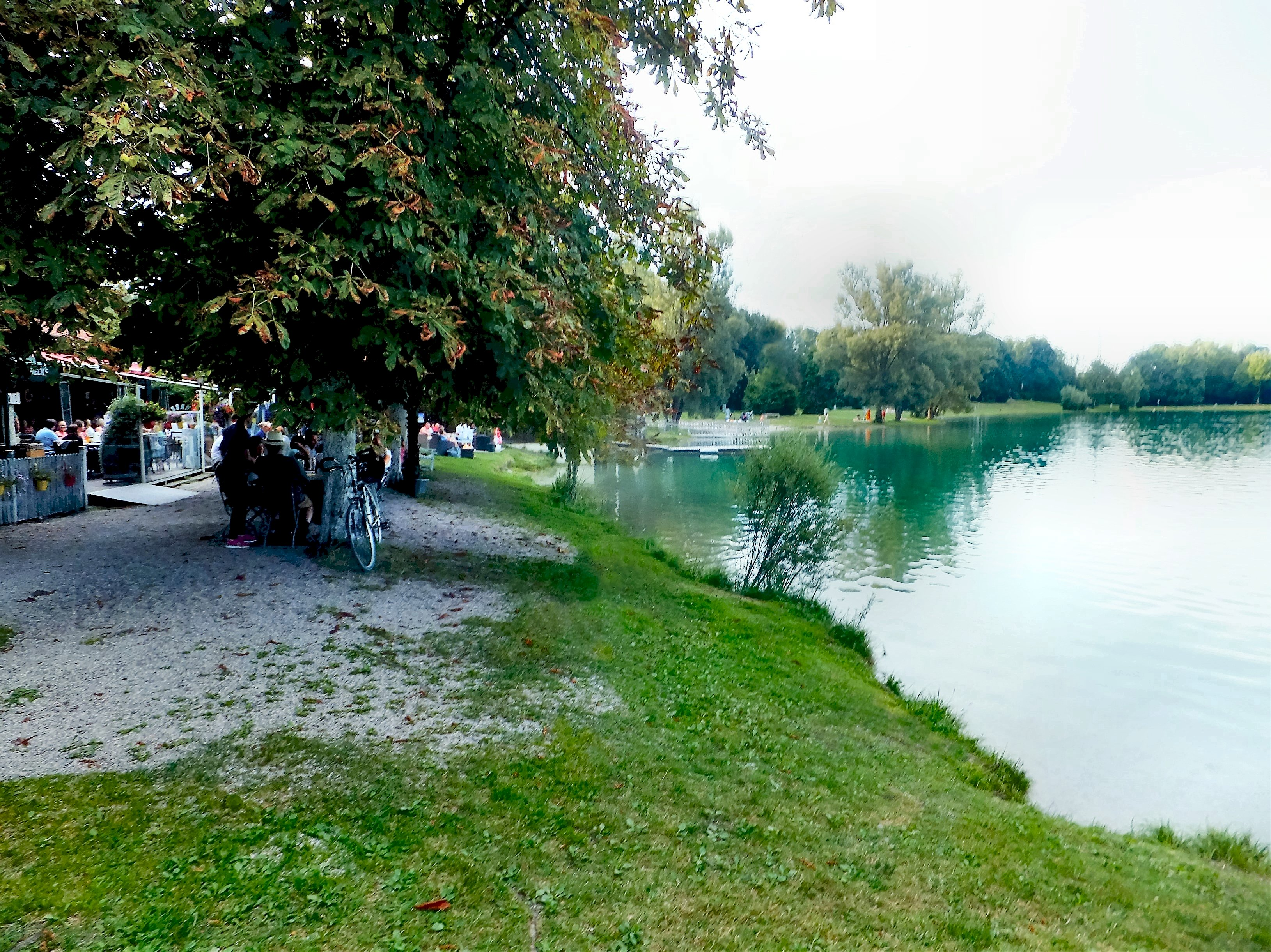 Unterschleißheimer See 27.8.2015 - 7